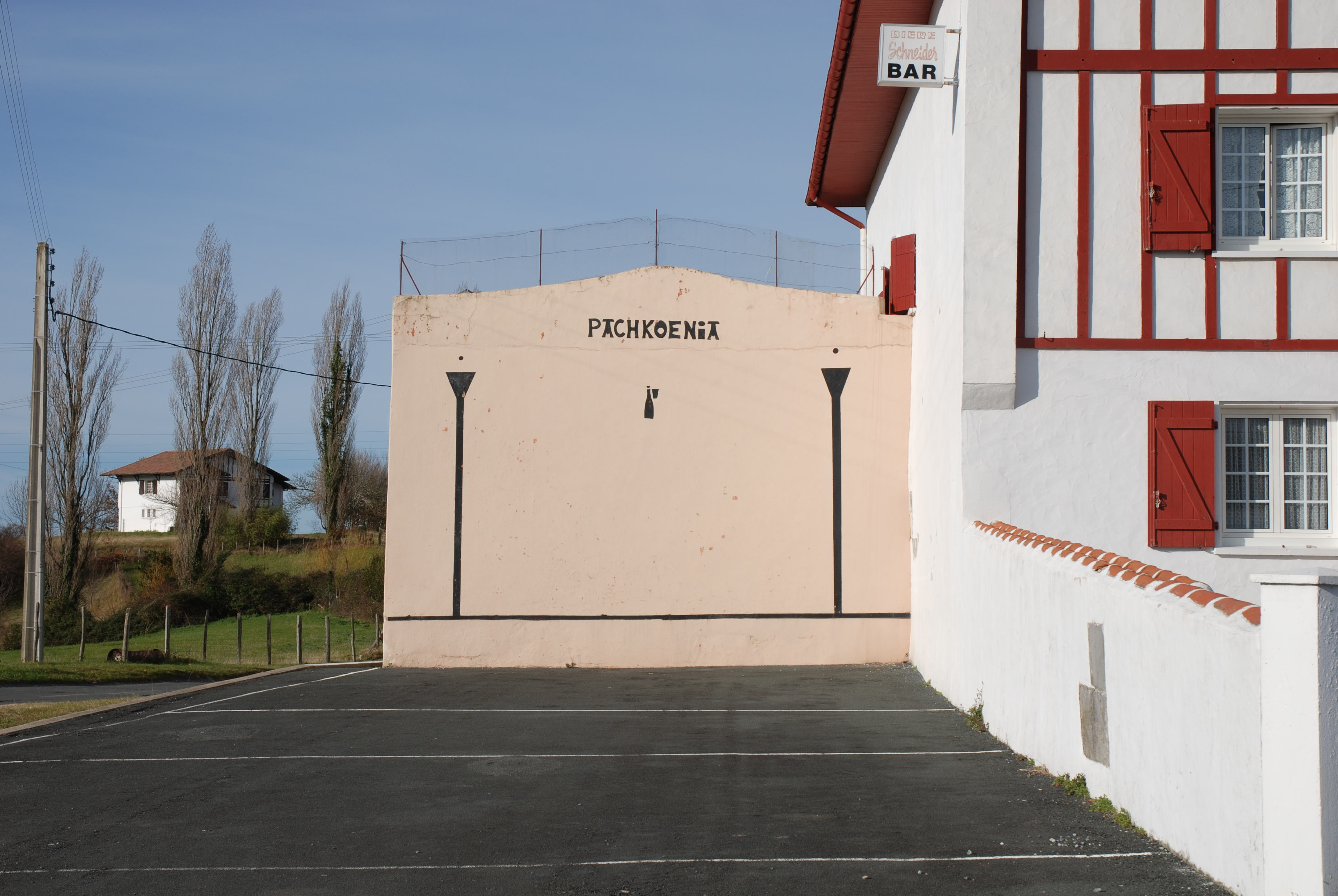 Hasparren, le fronton. Photo prise le 31/12/06 par Harrieta171